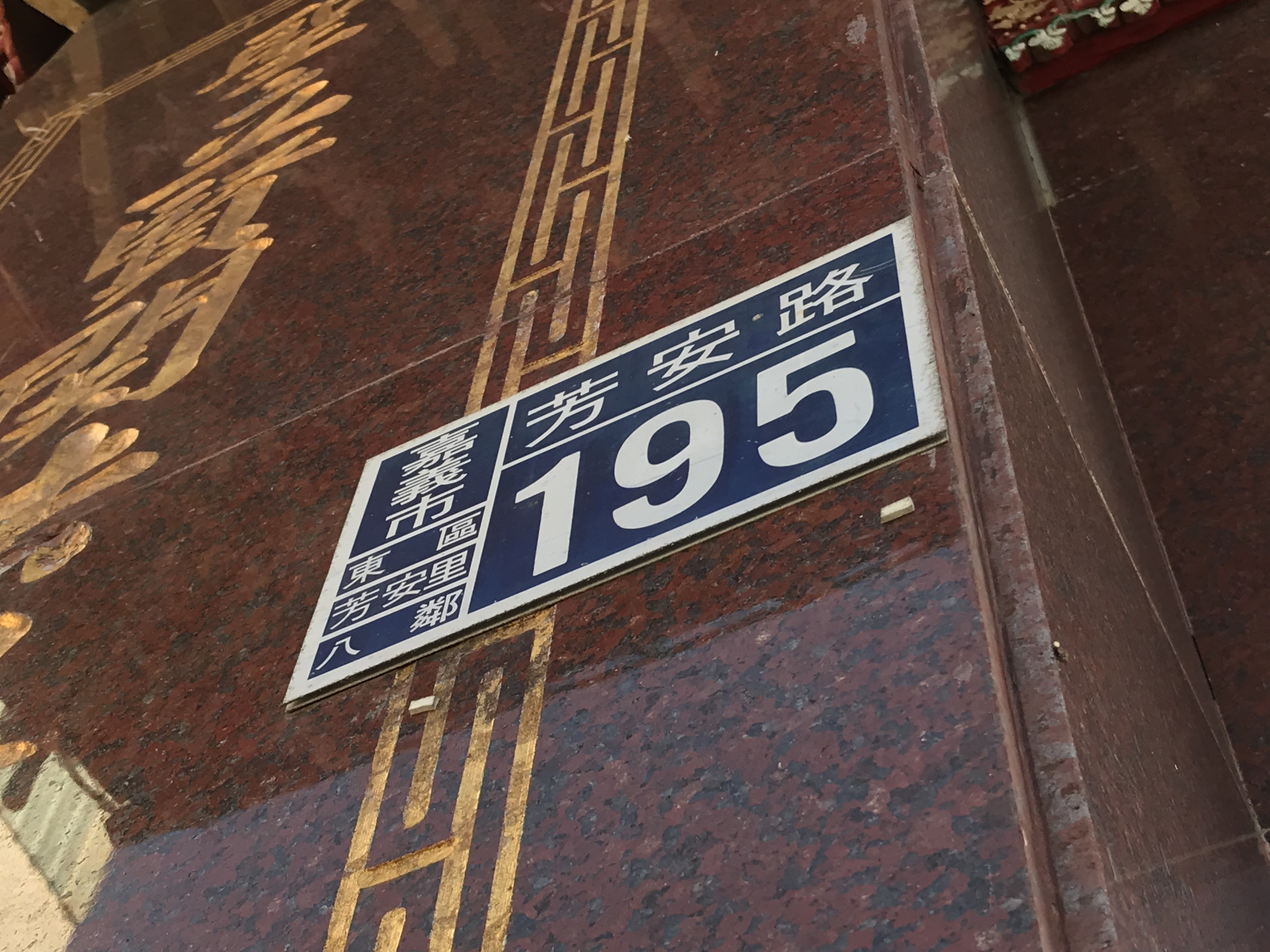 中文（台灣）: 嘉邑鎮天宮門牌